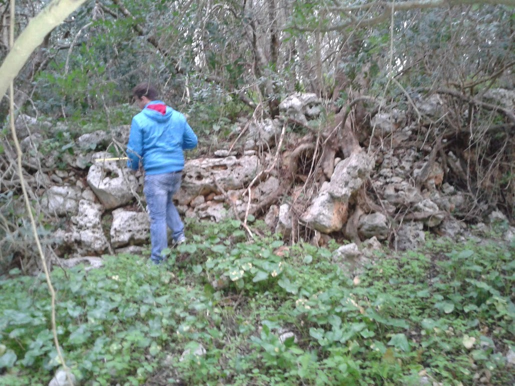 Talaïot 1